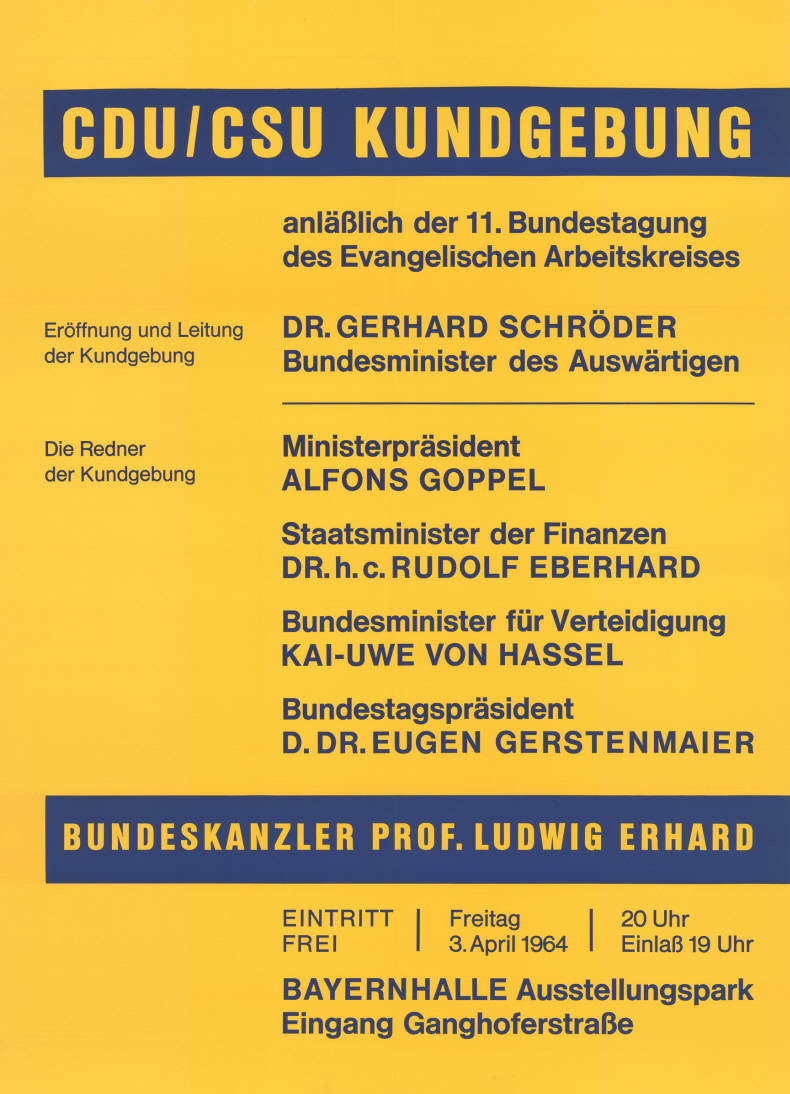 CDU/CSU Kundgebung anläßlich der 11. Bundestagung ... Eröffnung und Leitung der Kundgebung: Dr. Gerhard Schöder Bundesminister des Auswärtigen Die Redner der Kundgebung Ministerpräsident Alfons Goppel Staatsminister der Finanzen Dr. h.c. Rudolf Eberhard Bundesminister für Verteidigungf Kai-Uwe von Hassel Bundestagspräsident D. Dr. EugenGerstenmaier Bundeskanzler Prof. Ludwig Erhard ...Plakatart:AnkündigungsplakatObjekt-Signatur:10-031 : 369Bestand:CDU-Plakate (10-031)GliederungBestand10-18:CDU-Plakate (10-031) » Ankündigungsplakate » 1960 - 1969Lizenz:KAS/ACDP 10-031 : 369 CC-BY-SA 3.0 DE